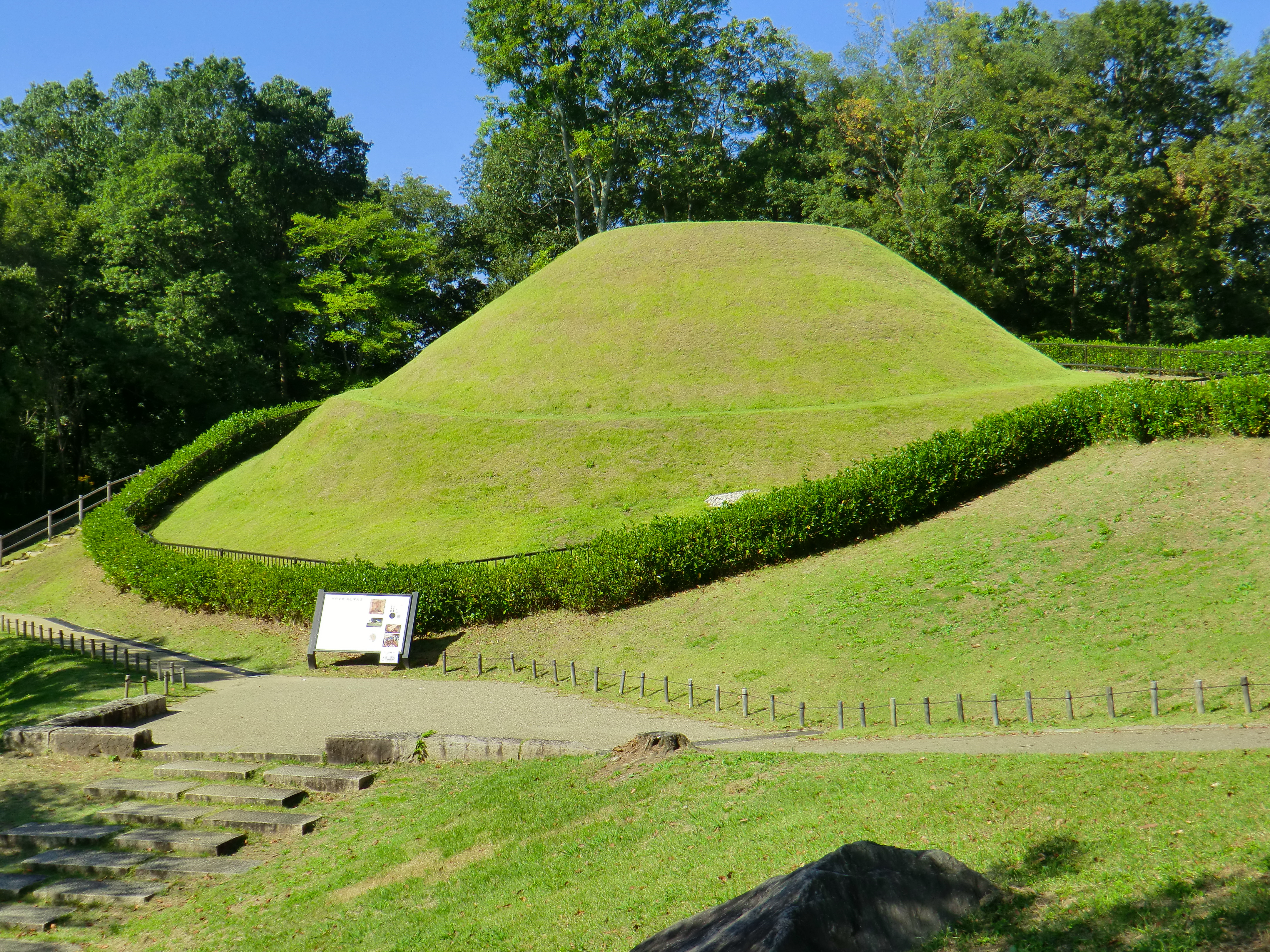 高松塚古墳、2014年10月撮影。